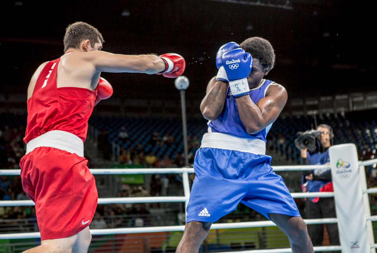 Day 3